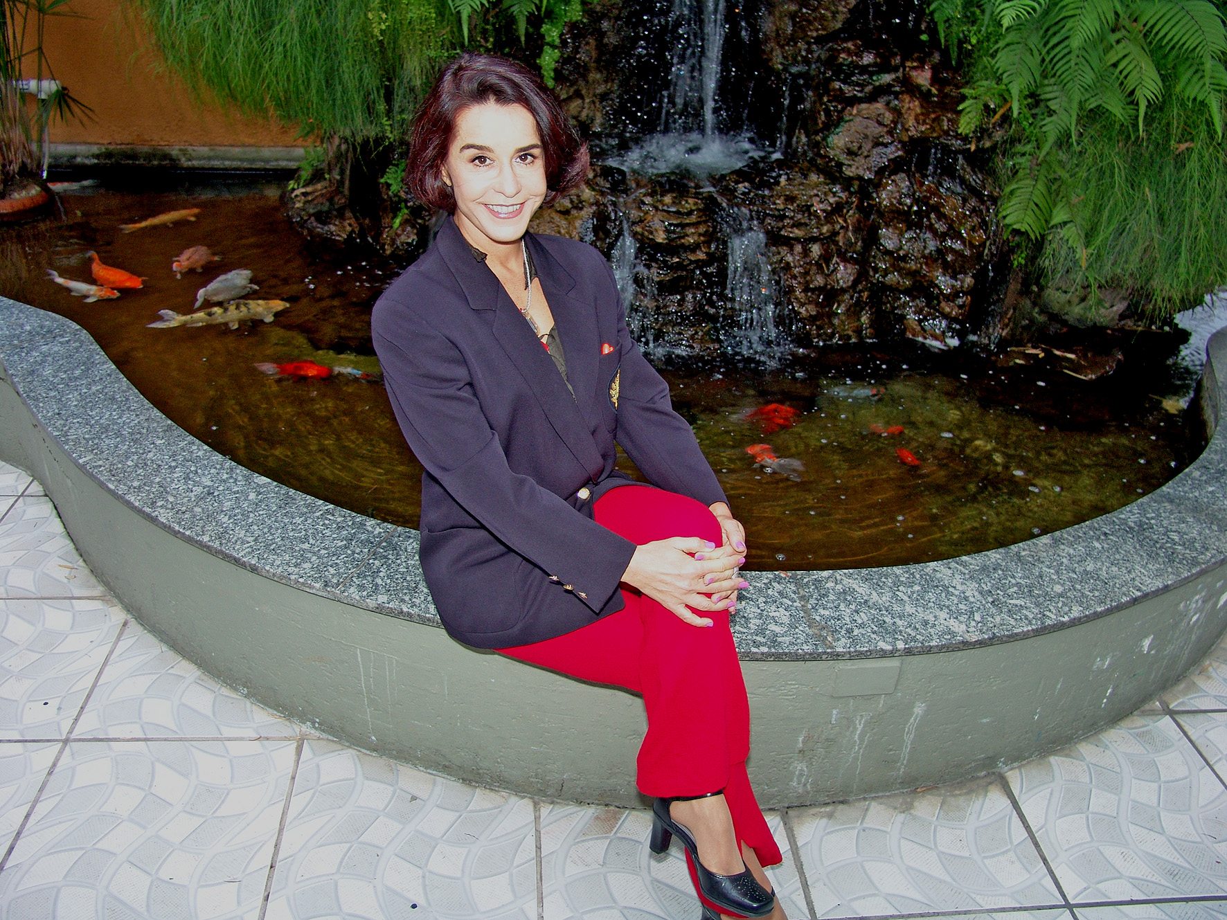 Lucélia Santos